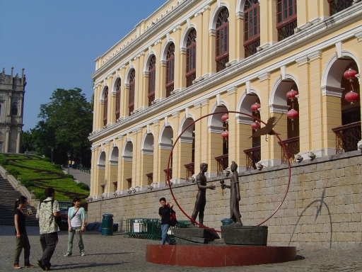 Statue